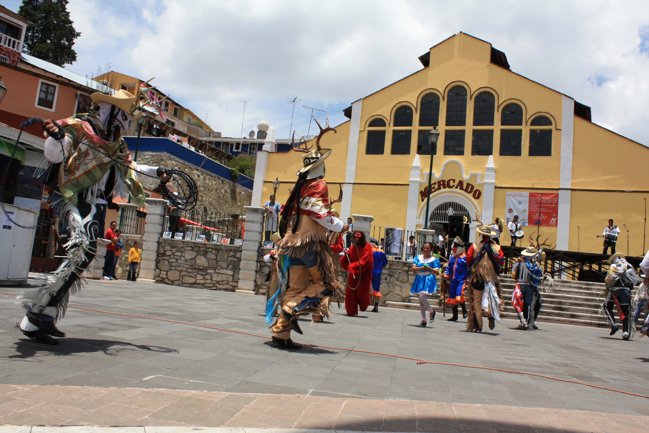 Mineral del Monte